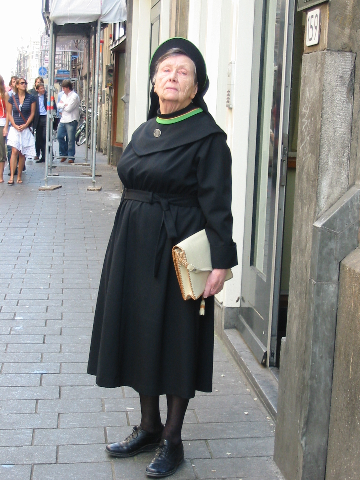 Zuster Augustinesse in de Warmoesstraat in Amsterdam. Augustinian nun in Amsterdam